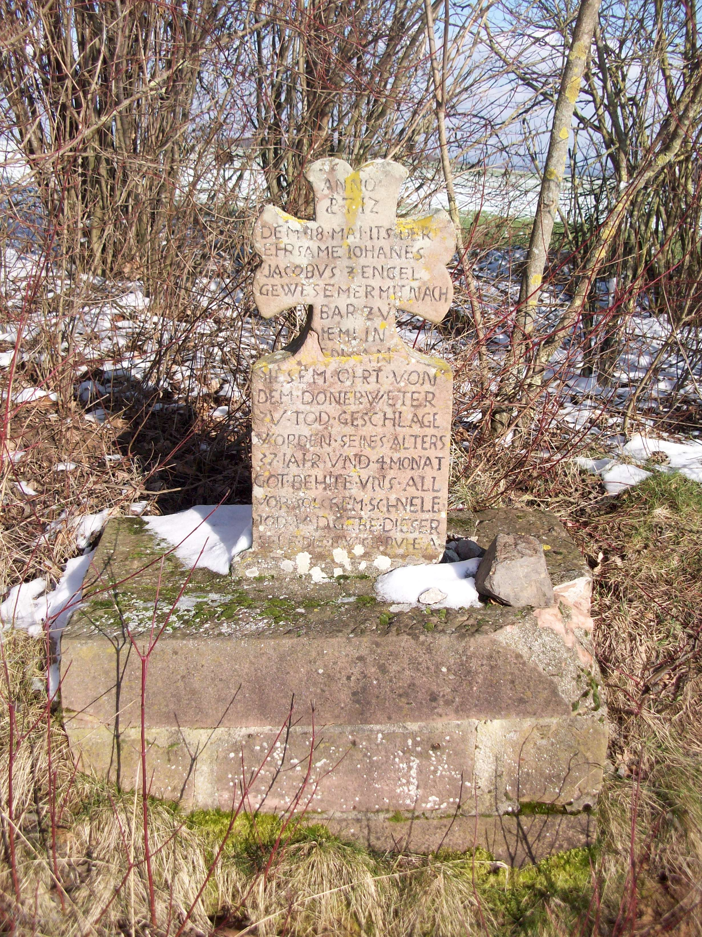 Steinkreuz von 1712 in der Gemarkung Mömlingen östlich des Ortes und nördlich der Teufelslochquelle